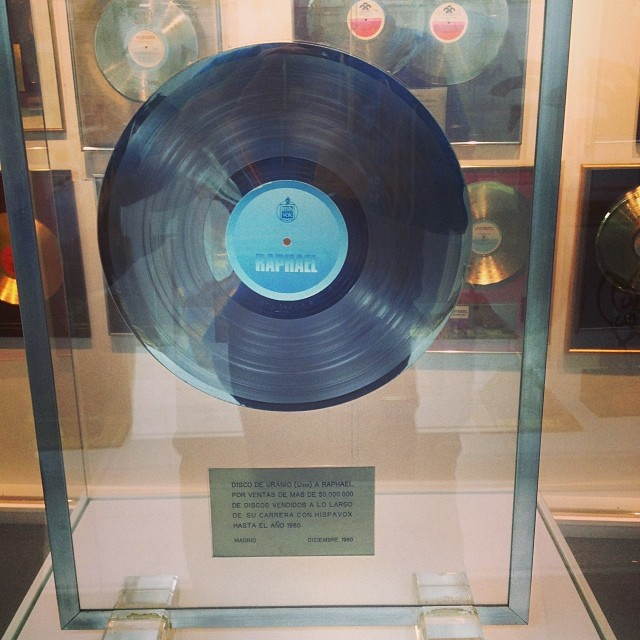 El disco de Uranio solo se le da a los cantantes que han vendido 50.000.000 de discos o más.